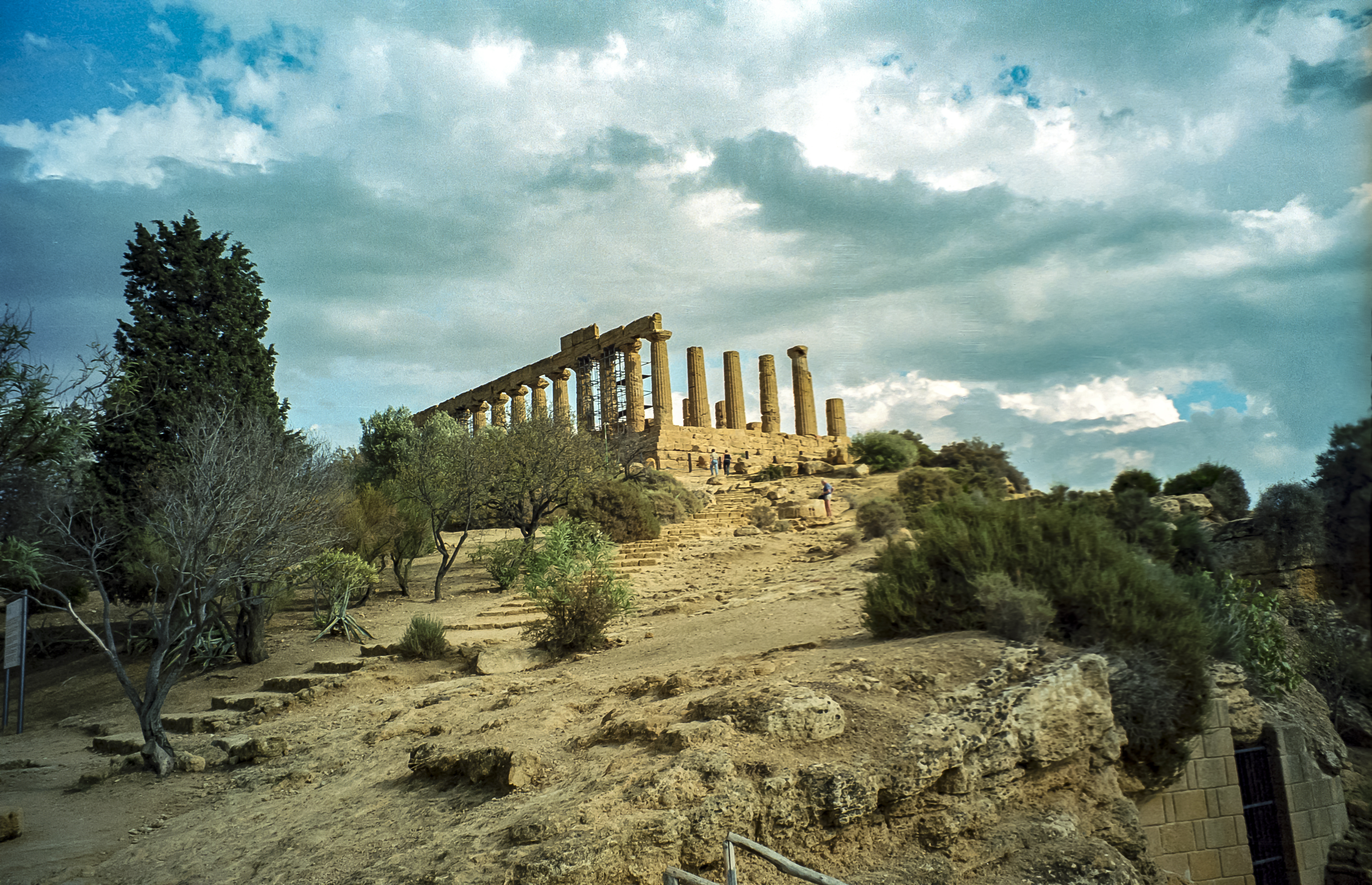 Sicily, Świątynia Hery